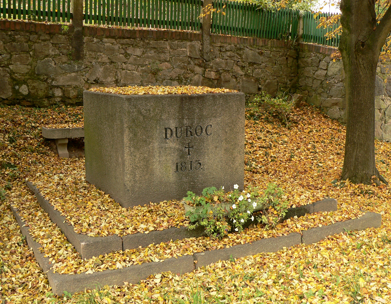 Denkmal für Géraud Christophe Michel Duroc, der 1813 in Markersdorf fiel